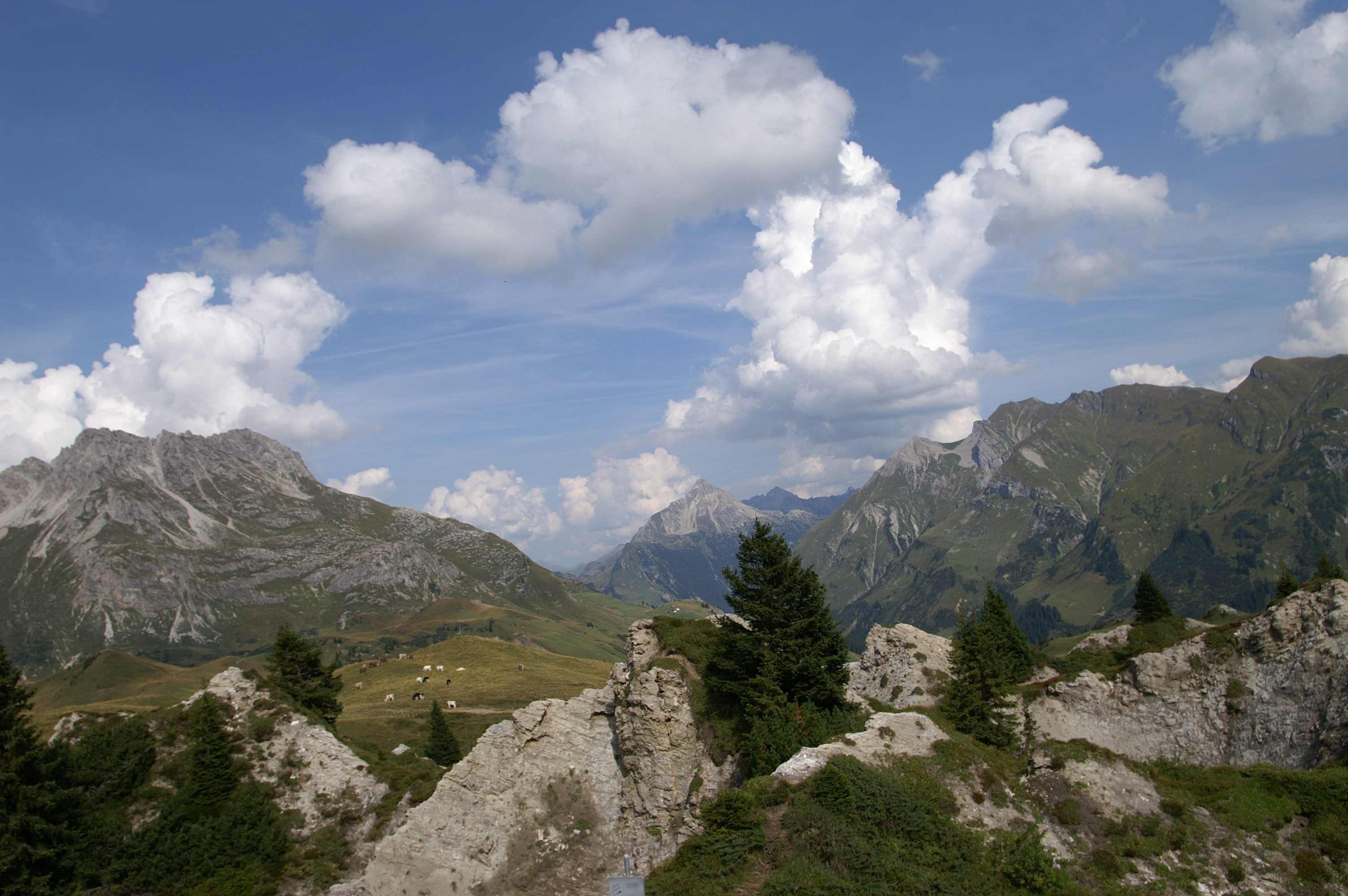 Naturschutzgebiet, Gipslöcher am Oberlech im Lechquellengebirge in Vorarlberg, eingerichtet 1988, 21 ha / im Hintergrund mittig der Biberkopf 2599m